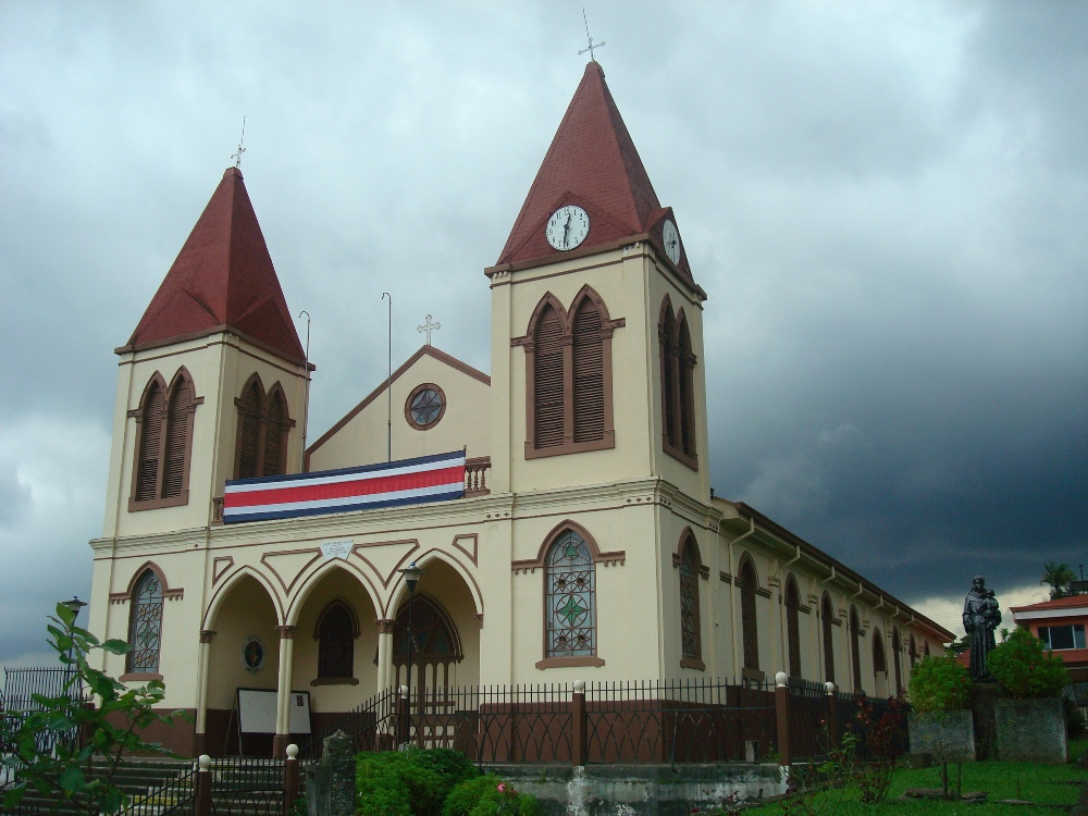 Iglesia de San Antonio de Padua en el distrito de San Antonio, Escazú, Costa Rica.